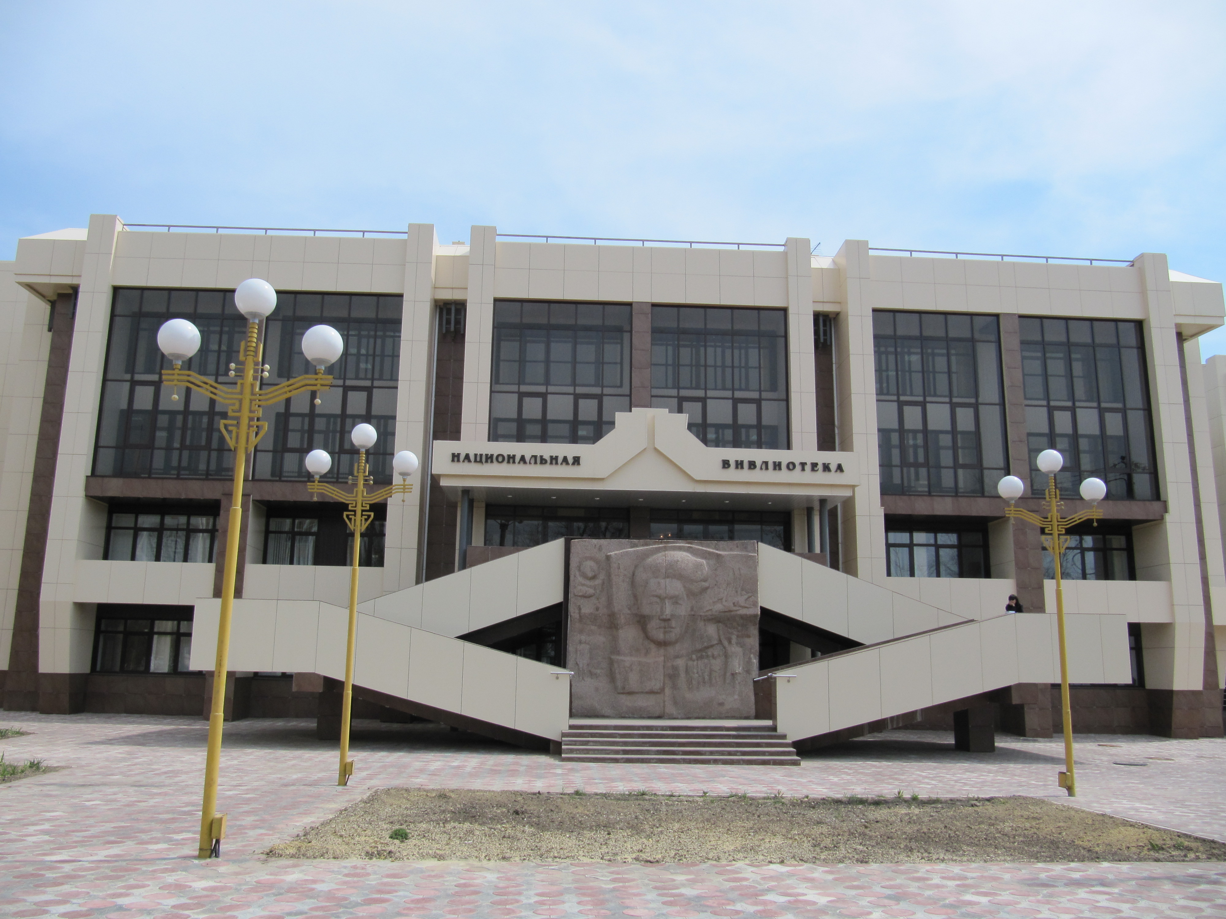 Национальная библиотека Калмыкии, Элиста.